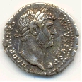 Munt uit mijn verzameling (zelf gescand)